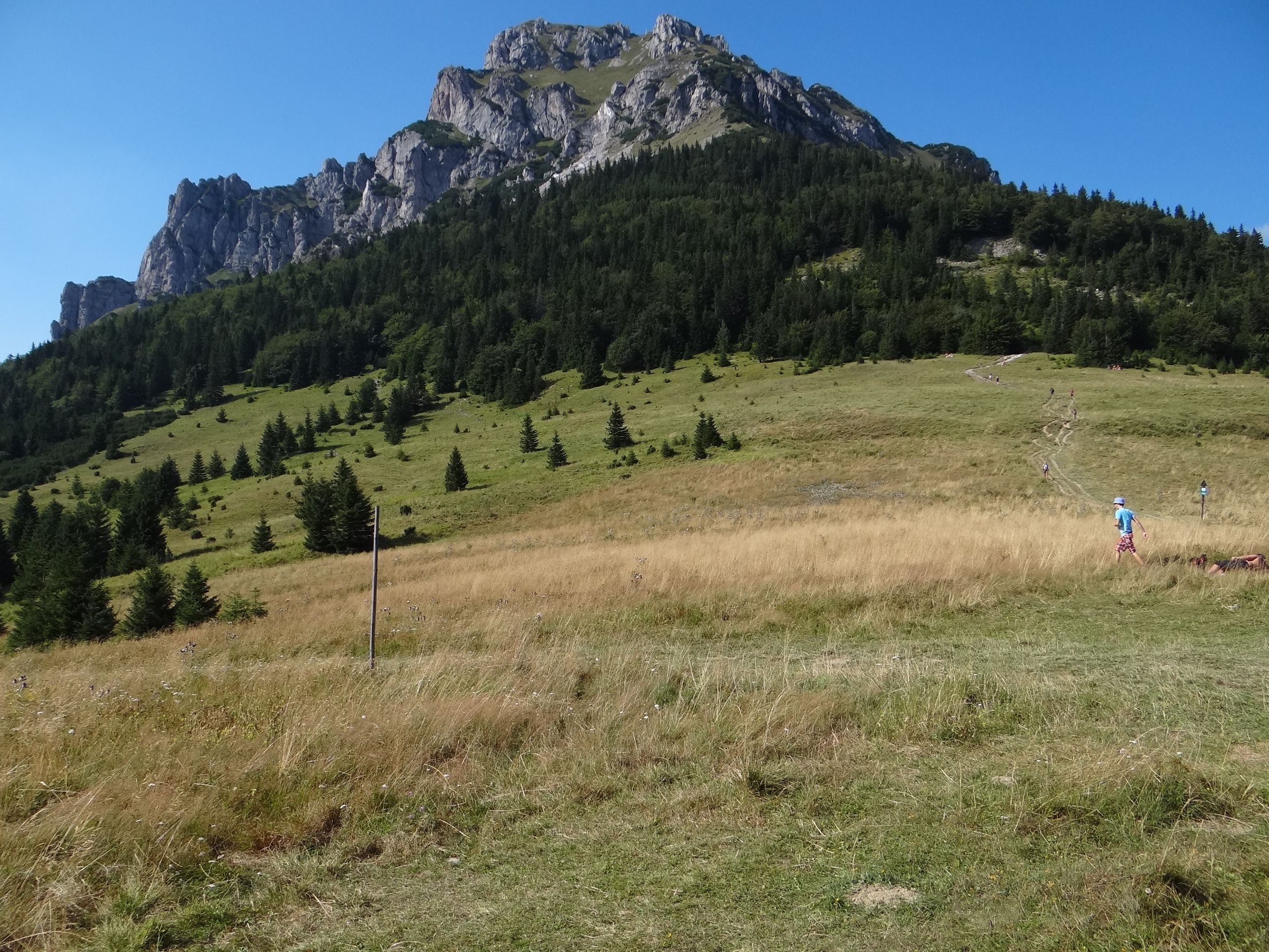 Medziholie, Veľký Rozsutec